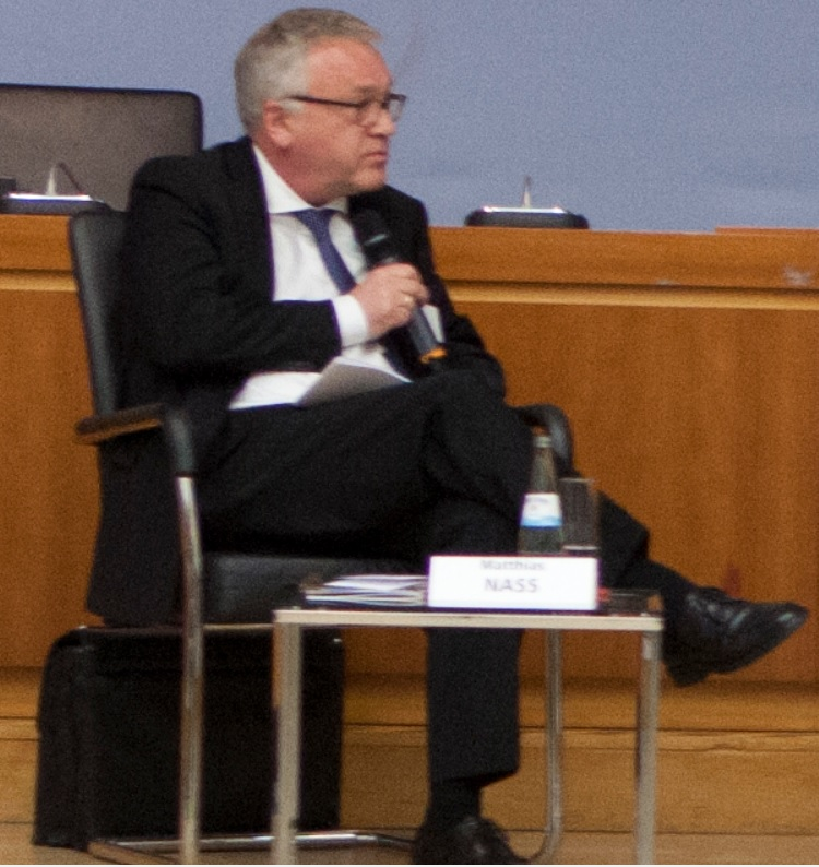 Matthias Naß of Die Zeit, May 2017